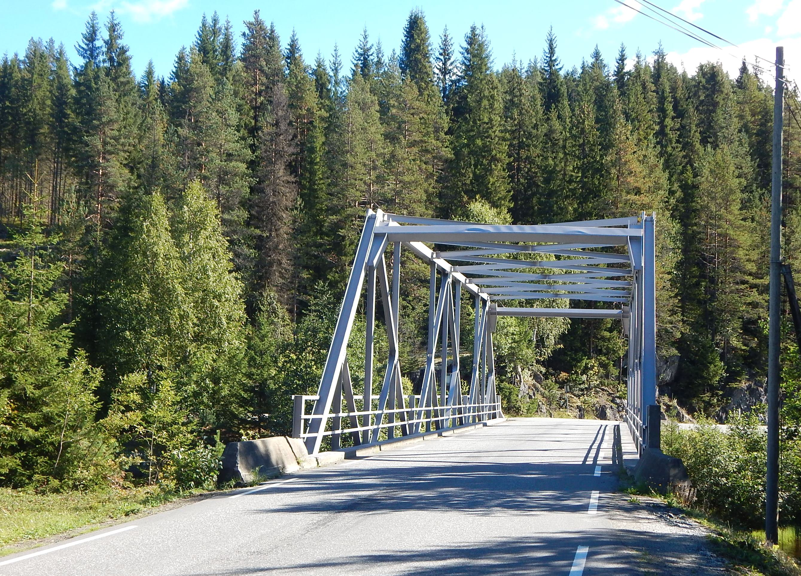 Fylkesvei 2424 (tidl. 186) krysser Dokka på Valhovd bru.